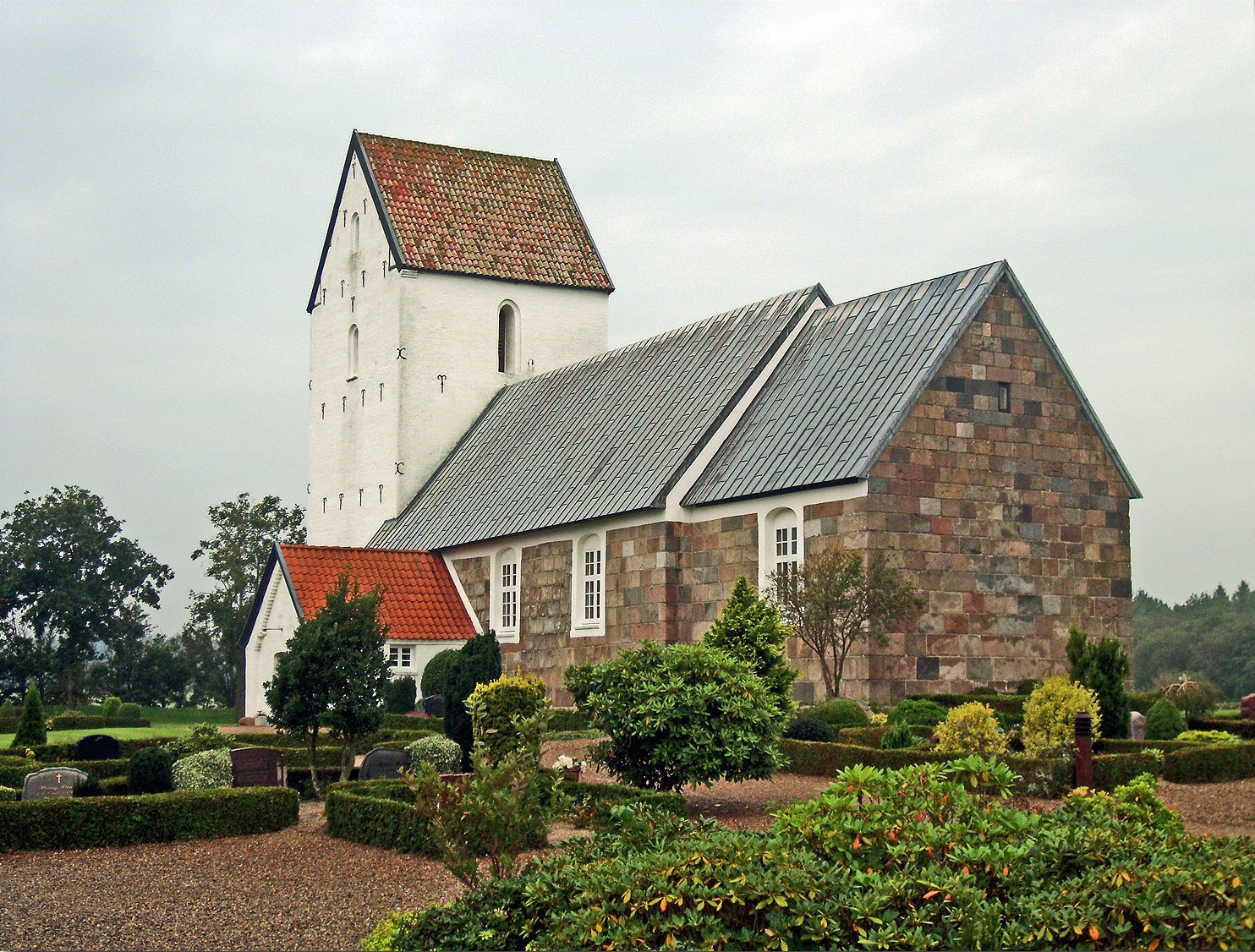 fra sydøst